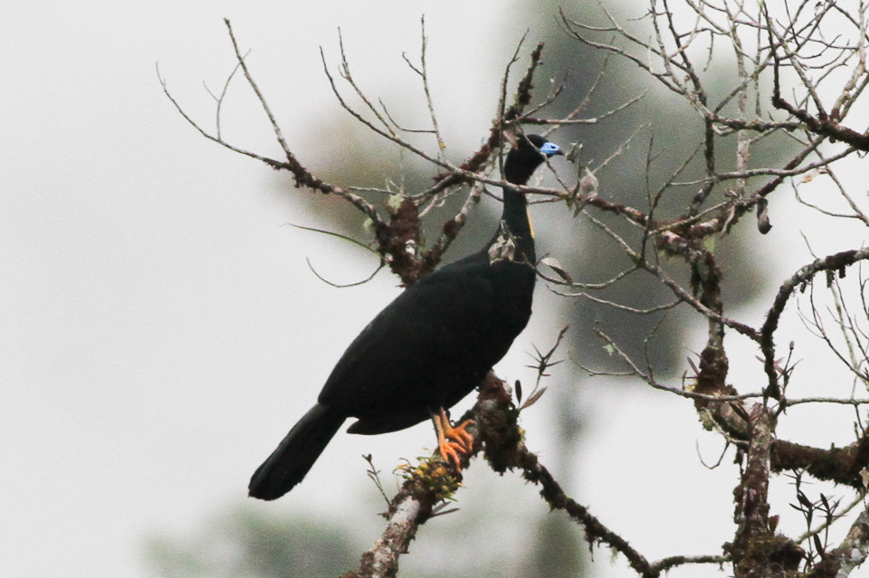 San Augustin,Huila